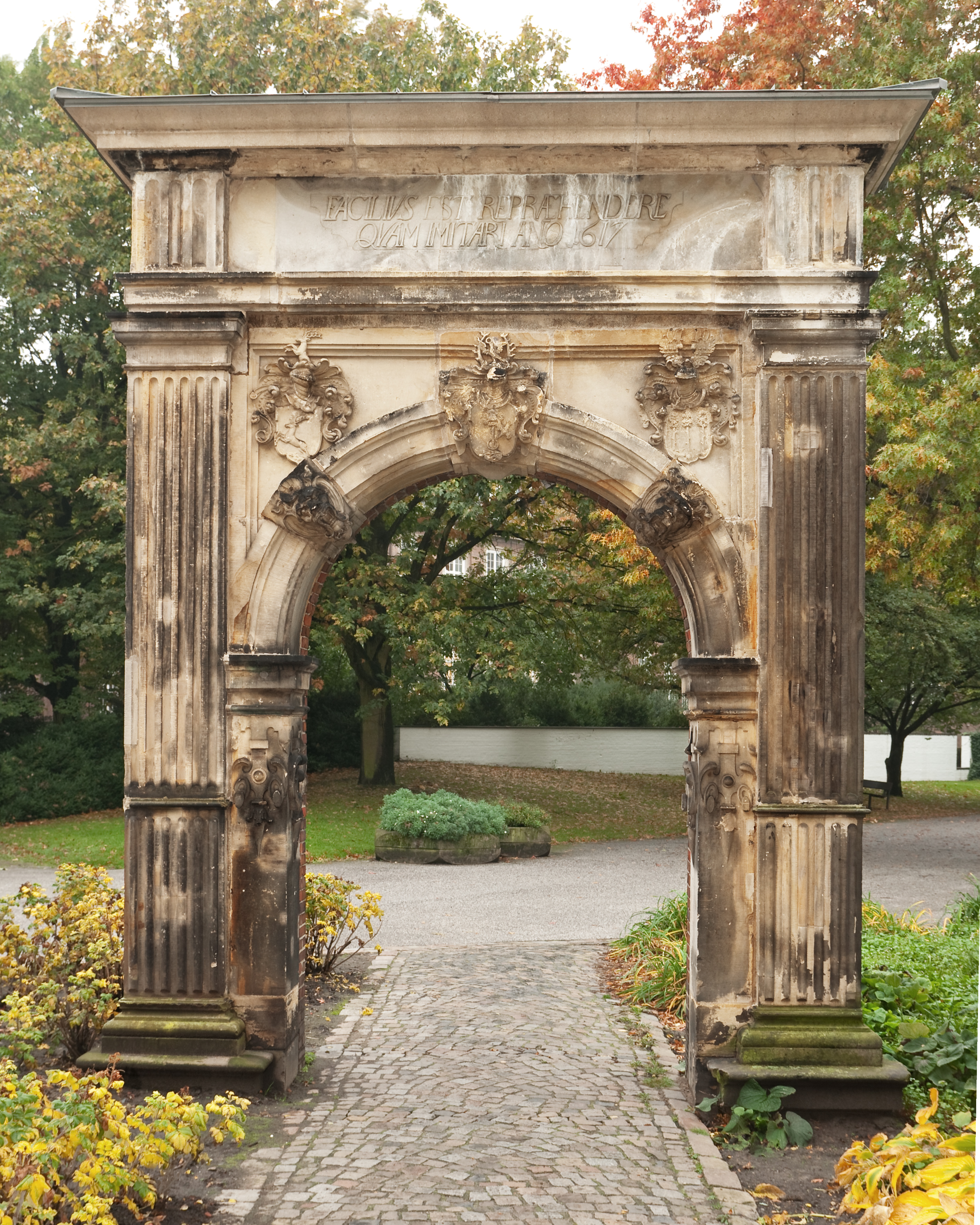 Auf dem Portal befinden sich die Wappen der Fam. Schrötteringk (Mitte), vom Holte (rechts), Hartiges (links)Herkunft: "Rotes Haus", Gr. Reichenstraße 49Inschrift: "Facilius est repraehendere quam imitari Ano 1617" (Es ist leichter zu tadeln als nachzumachen)Bemerkung: Der untere Teil des Portals wurde eingeschüttet.Vorbesitzer: Museum für Kunst und Gewerbe, Hamburg.Zustand: Risse, Verfärbungen und Schäden durch Umwelteinflüsse